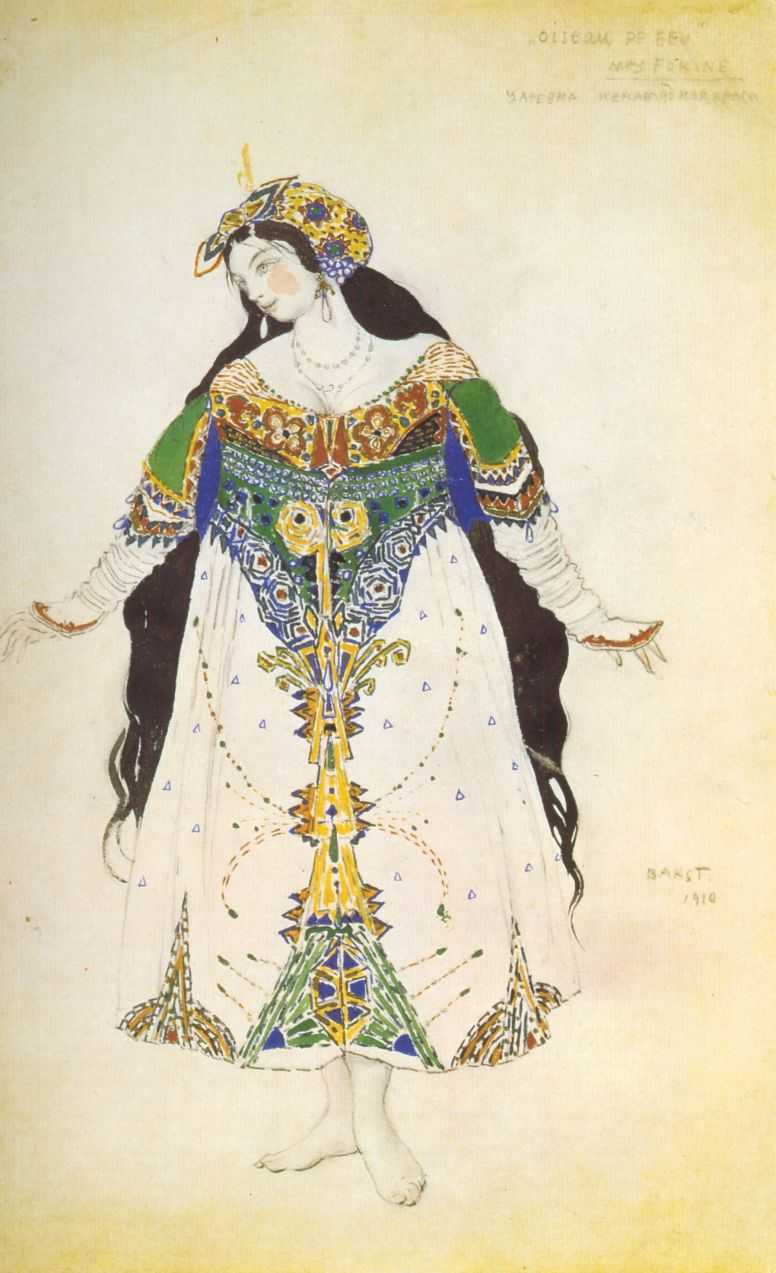 Эскиз костюма царевны для *Жар-Птицы* И.Стравинского. 1910 Костюм Веры Фокиной в роли Прекрасной царевны.